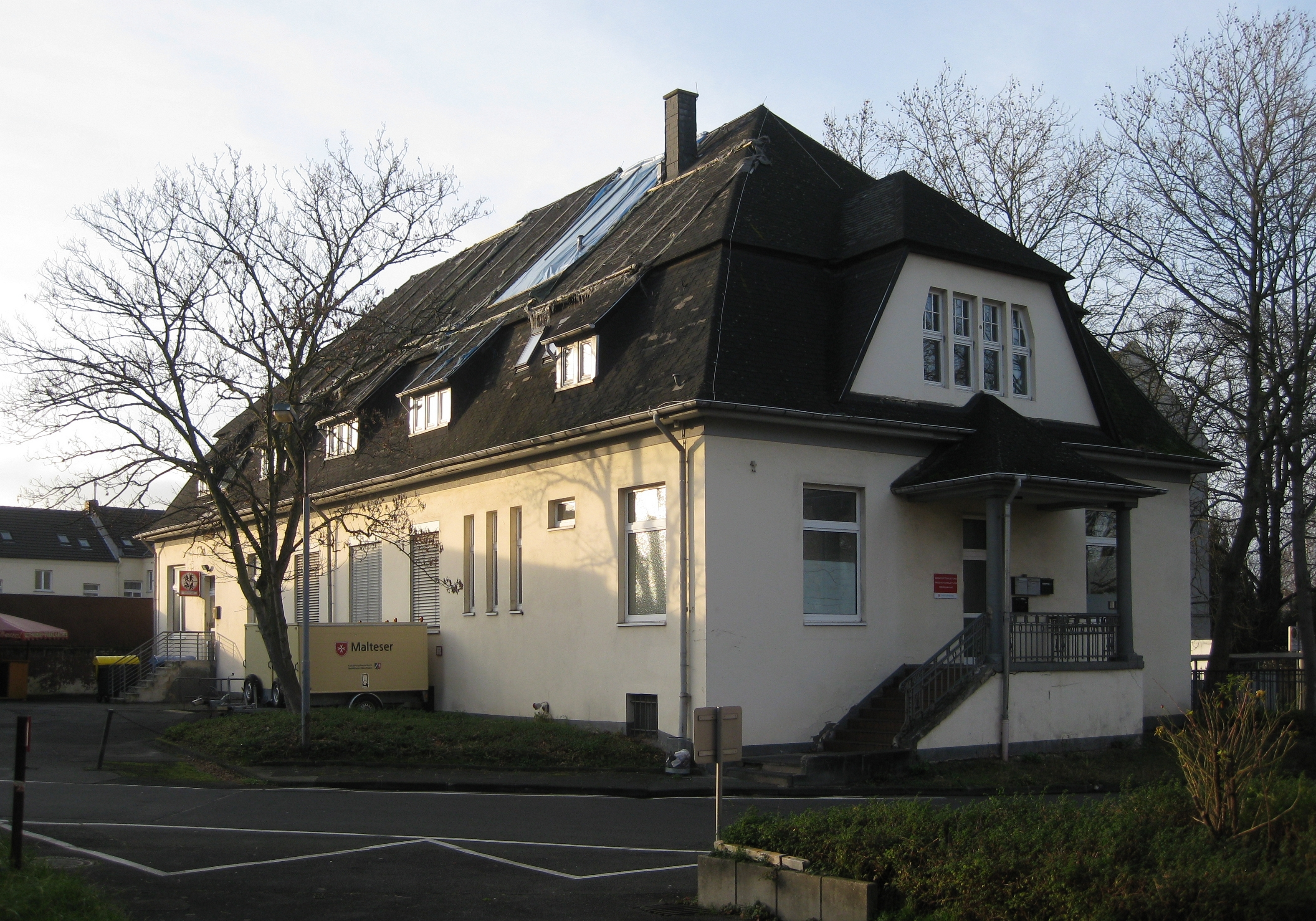 Deutschland, Bonn-Beuel, Siegburger Straße 42 (Bushaltestelle Pantheon Beuel; ehemals Schauspielhalle Beuel): Verwaltungsgebäude mit Büros der Werkstättenleitung, Produktionsleitung und des Personalrats auf den als Baudenkmal geschützten Fabrikanlagen einer ehemaligen Jutefabrik (gegr. 1868). Der hintere Teil (separater Eingang) wird von der Freiwilligen Feuerwehr Beuel genutzt. Seit 1981 ist das Gelände im Besitz der Stadt Bonn; Nutzer des Hallenkomplexes ist das Bonner Theater (Schauspiel & Oper) mit seinen Schauspielhallen; genannt „Halle Beuel“. Dort sind neben Probe- und Aufführungsbühnen auch Verwaltungsbüros, Werkstätten für Bühnenbau, Kostümschneiderei, Maskenbildnerei und Lager untergebracht. Für Publikumsaufführungen wurden drei Hallen genutzt: die eigentliche Halle Beuel, das Lampenlager und der Alte Malersaal. Auf dem Gelände verfügt auch die Freiwillige Feuerwehr Beuel über Garagen mit Einsatzfahrzeugen und ein Büro.